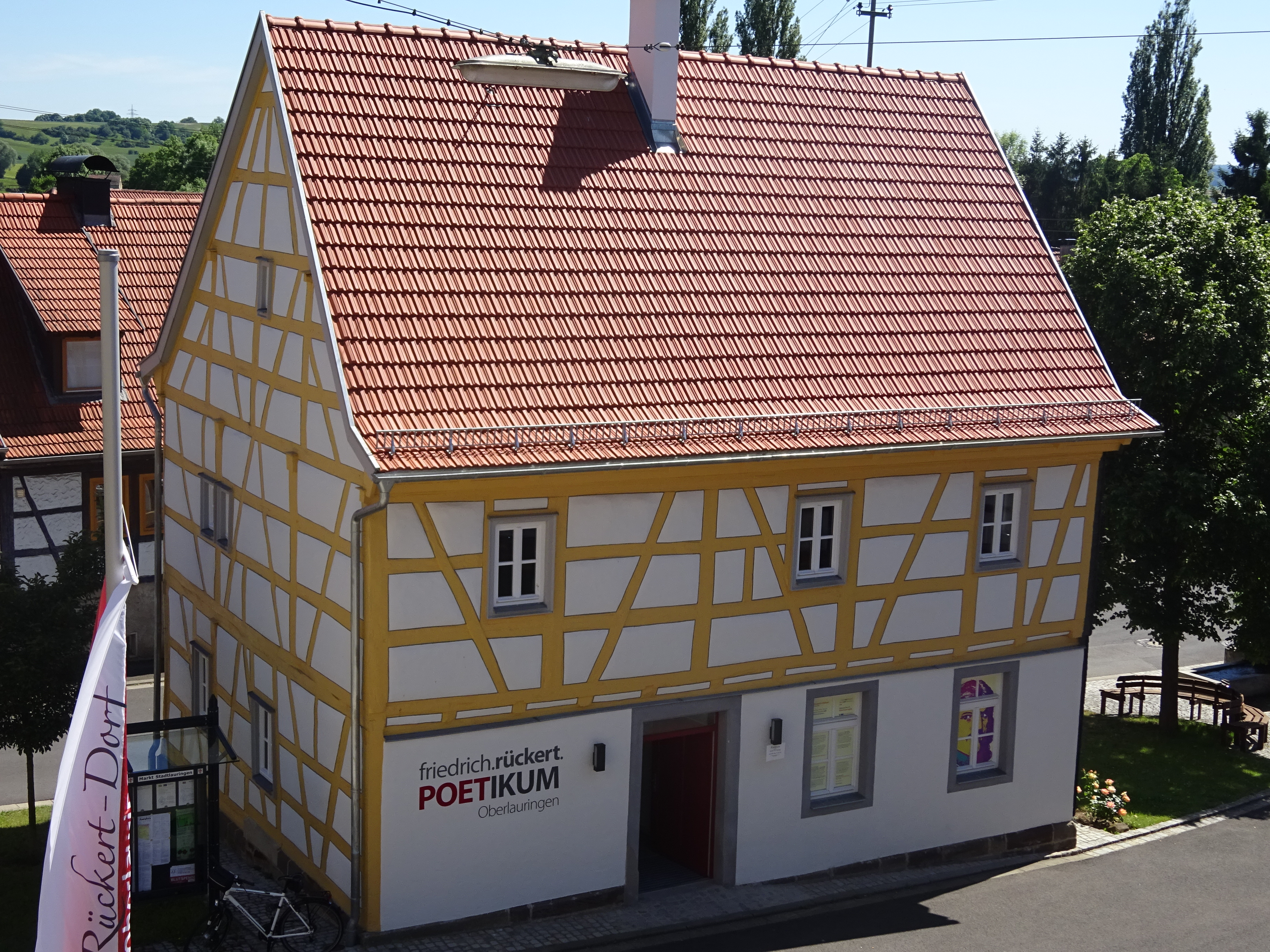 Oberlauringen Am Plan 1